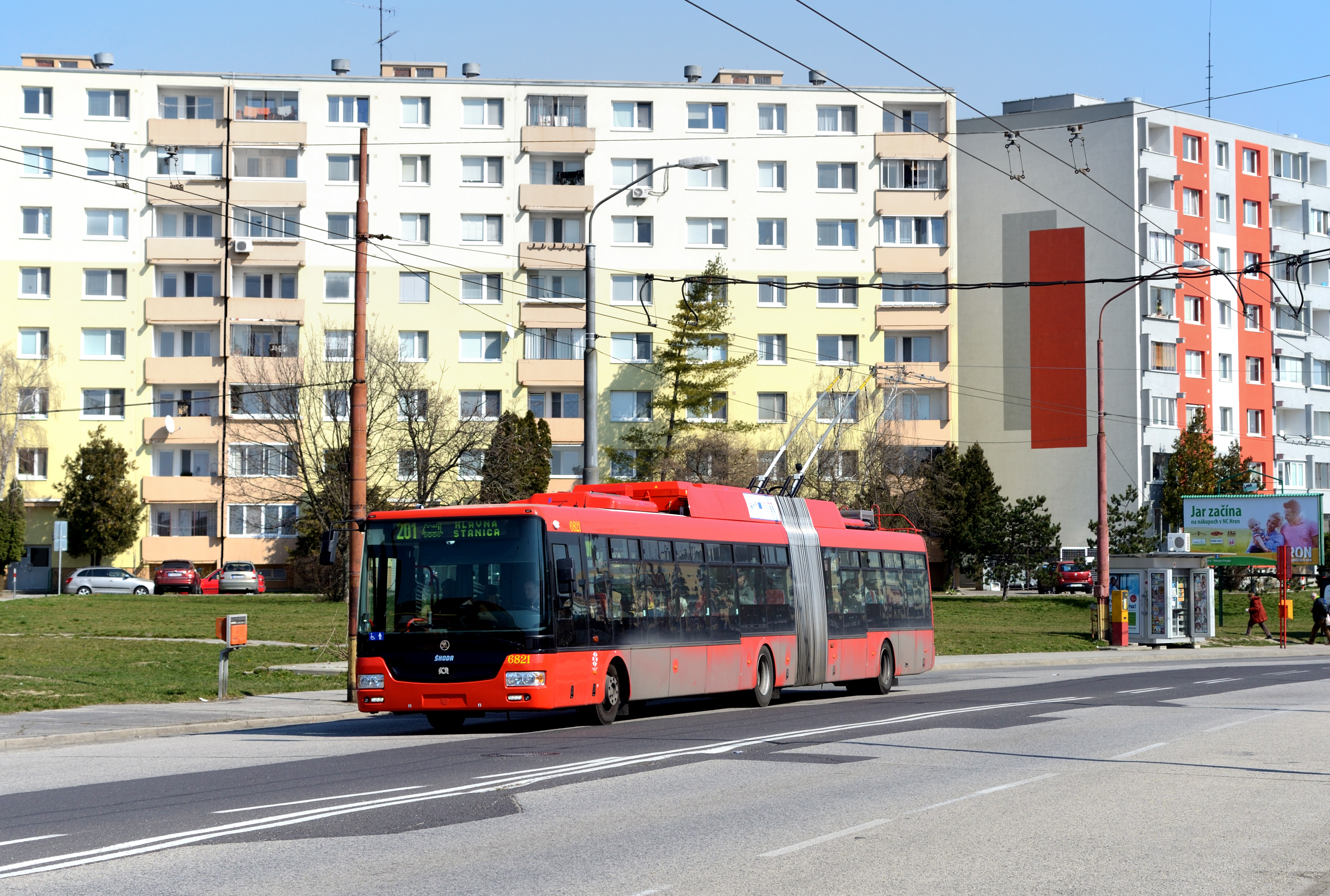 Skoda 31 Tr SOR 6821 als Linie 201 bei der Haltestelle Komarovska.